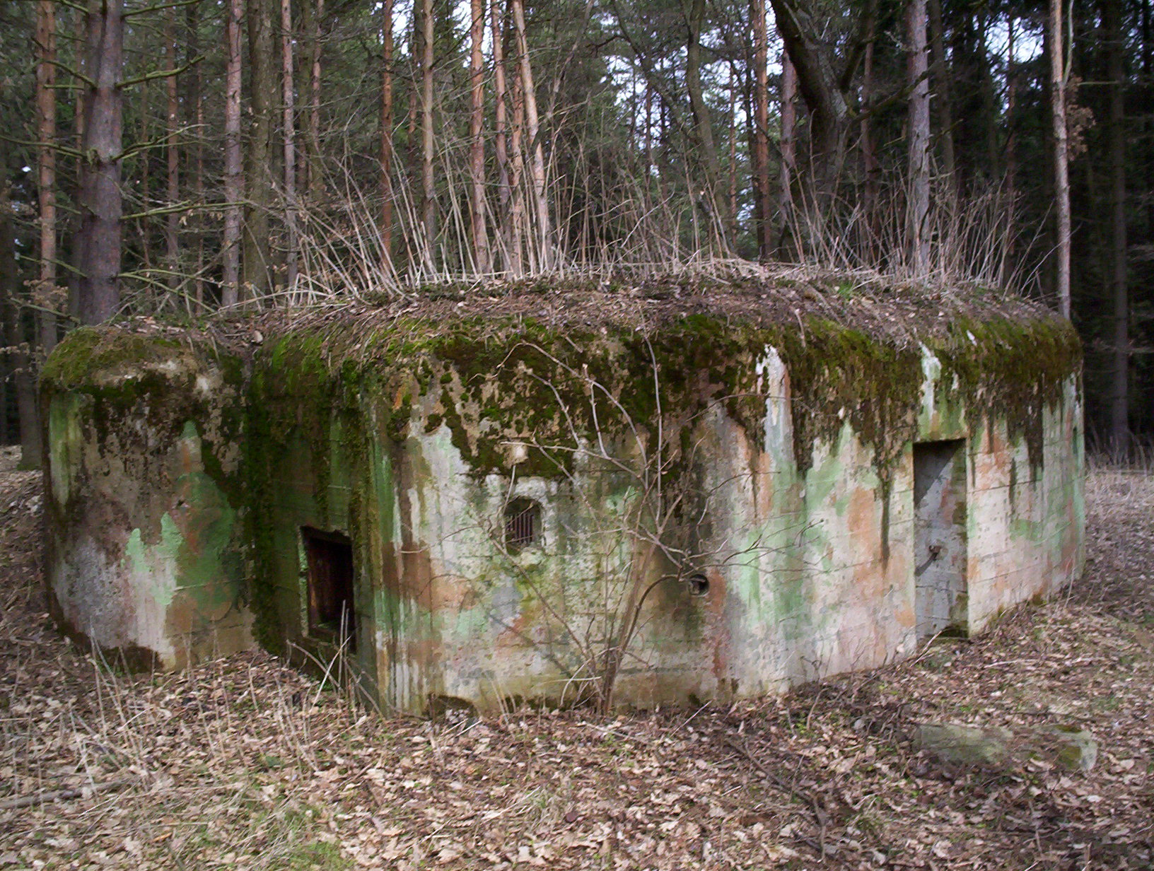 lehký objekt (blízko kapličky Umíř)